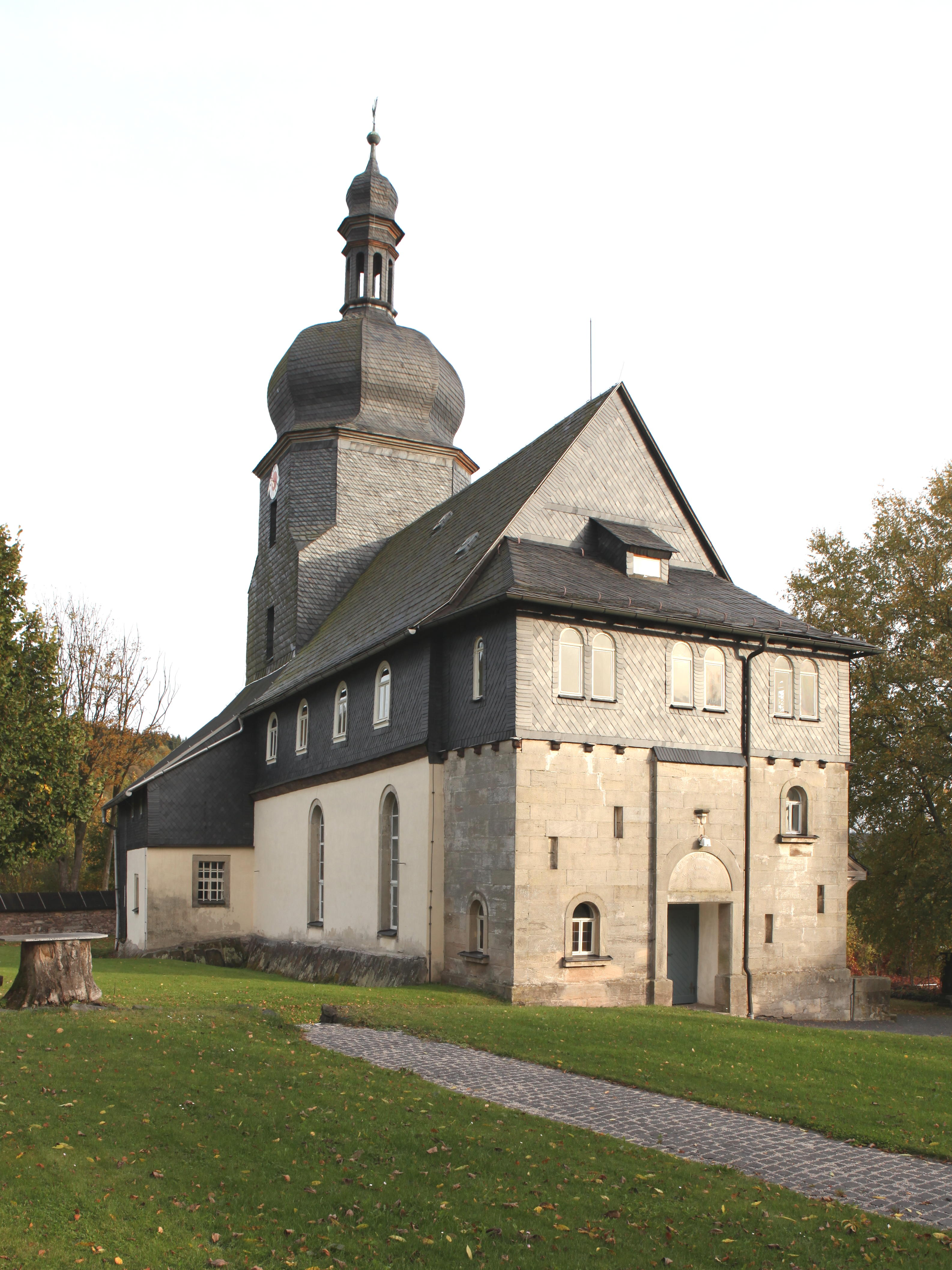 evangelisch-lutherische Kirche St. Marien, Kirchstraße 10 Heinersdorf, OT von Judenbach, Landkreis Sonneberg